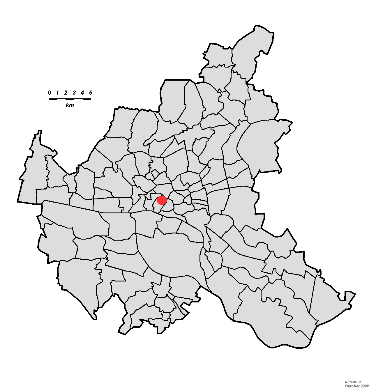 Lage des Gänsemarktes in Hamburg.